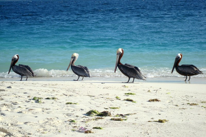 Madrisqui, Los Roques, Venezuela